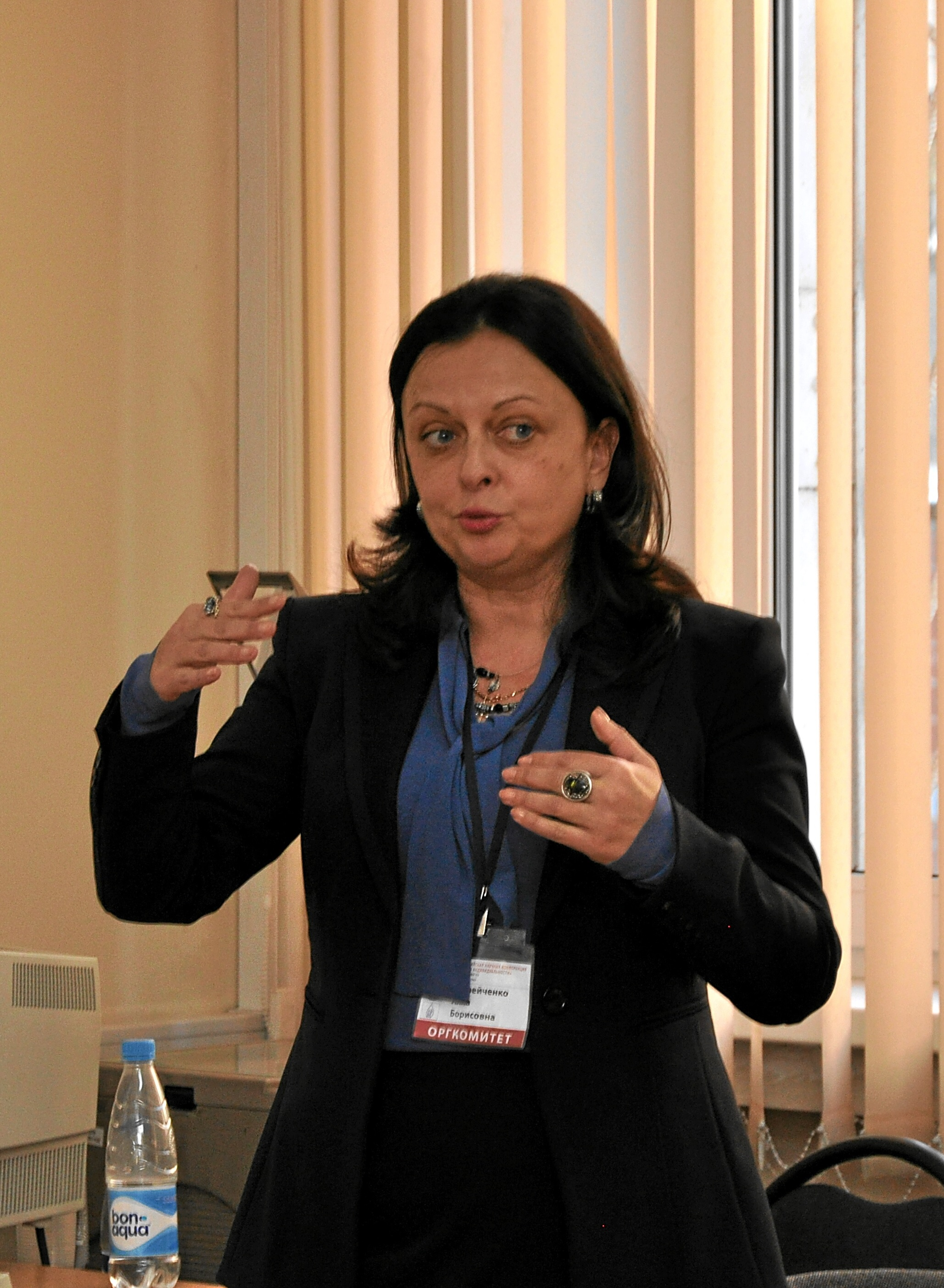 4-я Всероссийская конференция «Психология индивидуальности» 23.11.2012 в НИУ ВШЭ